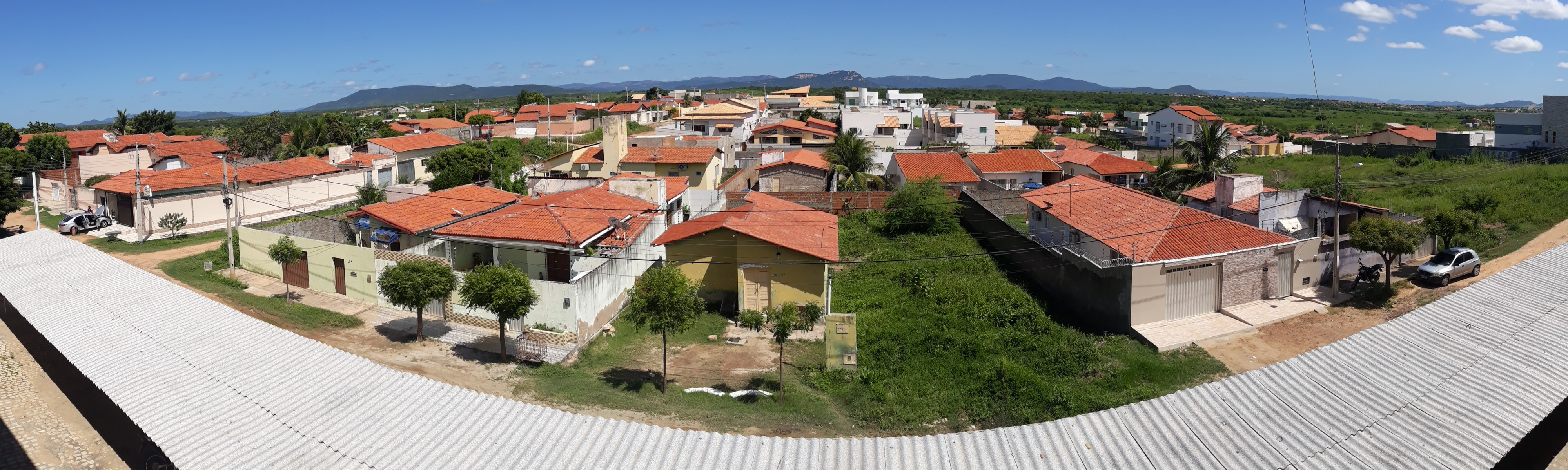 Conjunto Habitacional Nações Unidas, na periferia de Pau dos Ferros, no Rio Grande do Norte (Brasil)